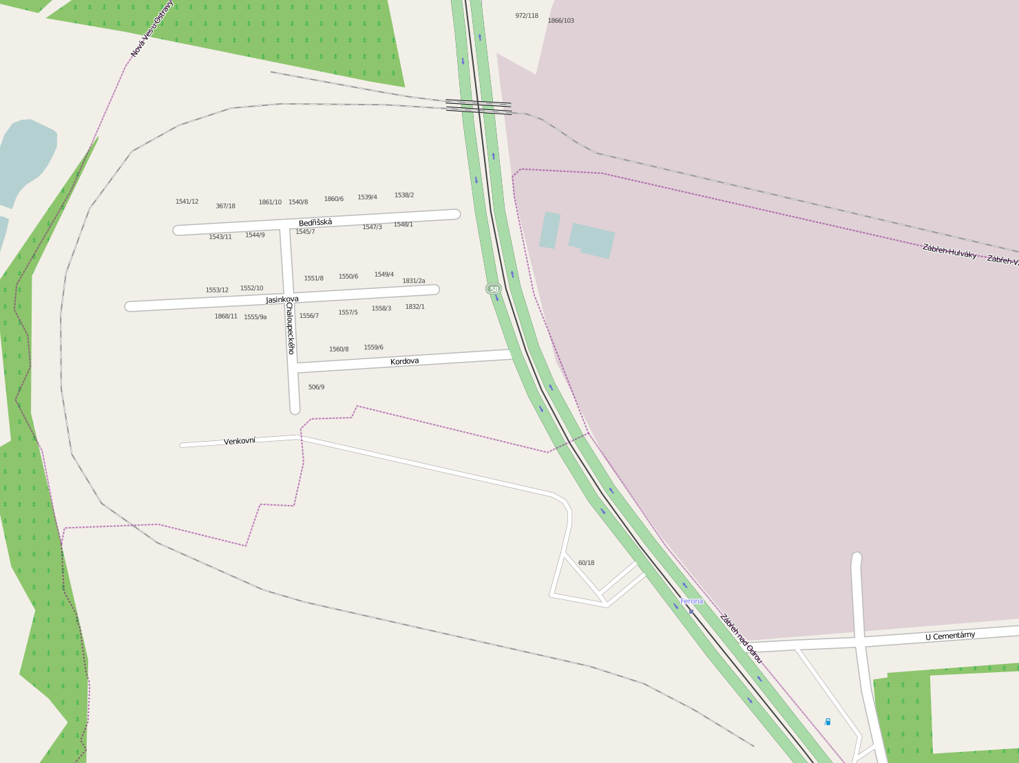 Osada Bedřiška na mapě (vlevo od Plzeňské ulice).